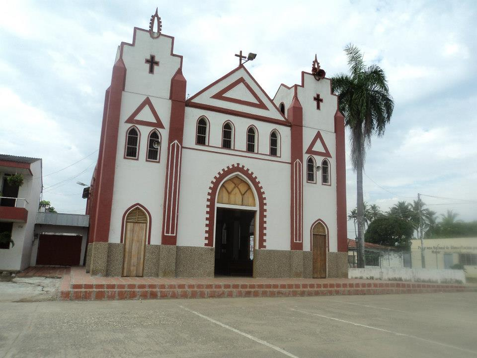 Iglesia del pueblo de San Bernardo del Viento.